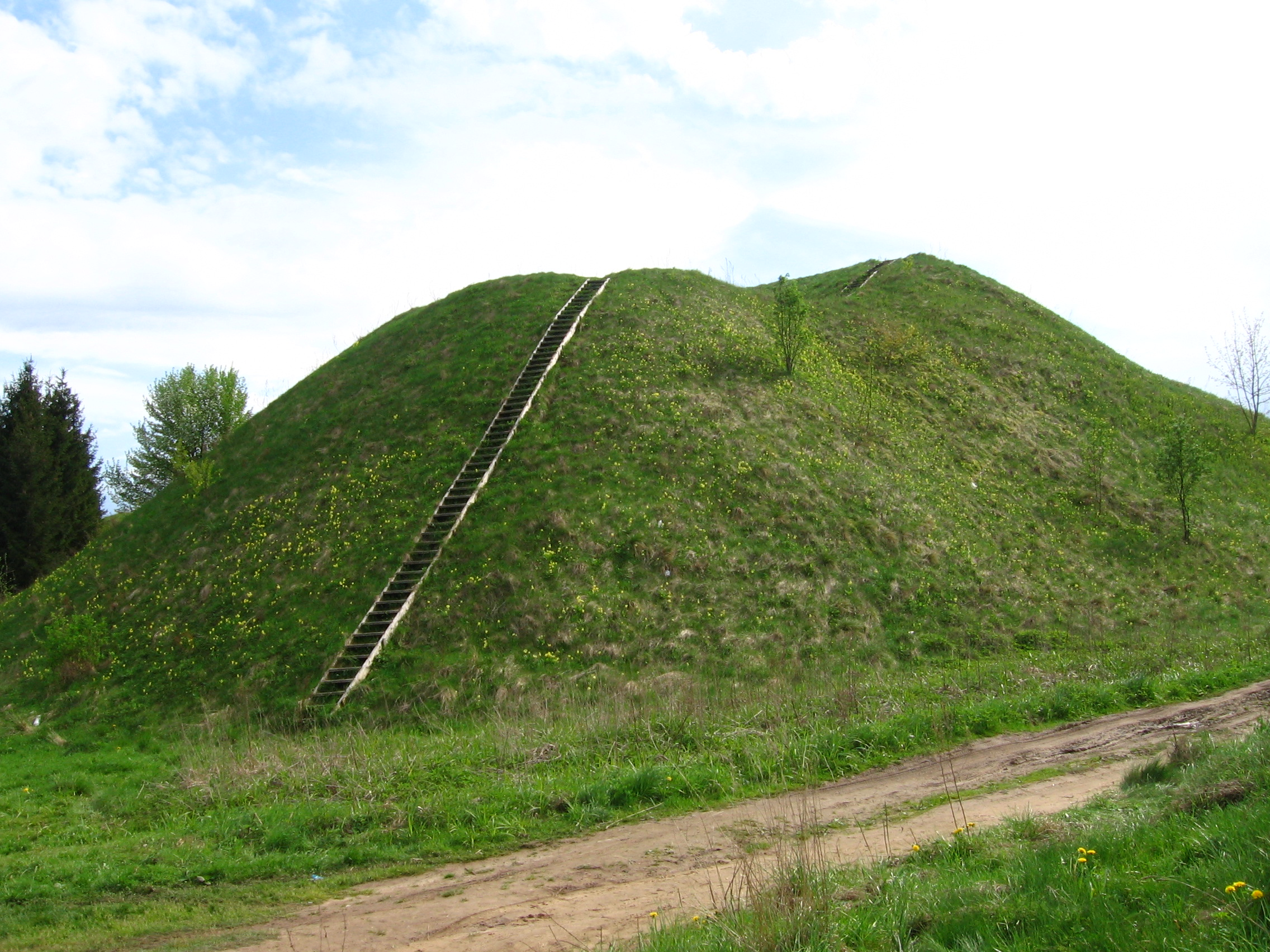 Paukščių piliakalnis, Prienų raj.